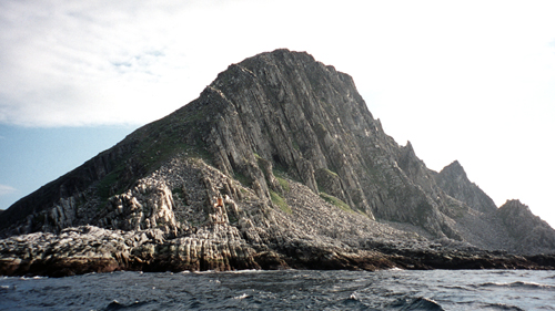 Der nördlichste Punkt von Europas Festland auf der norwegischen Halbinsel Nordkinn auf 71° 08' 01" nördlicher Breite: Kinnarodden.